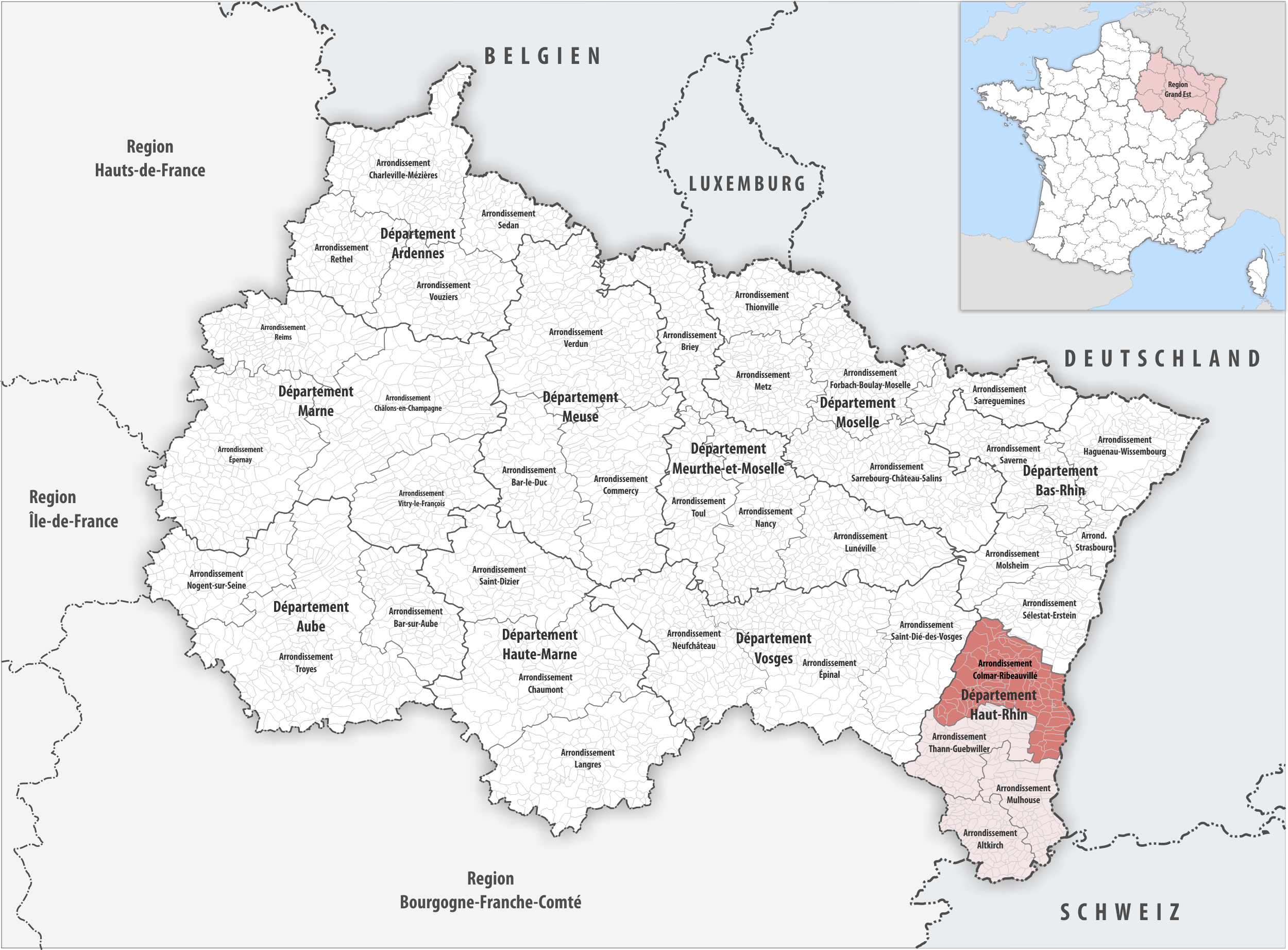 Lage des Arrondissements Colmar-Ribeauvillé